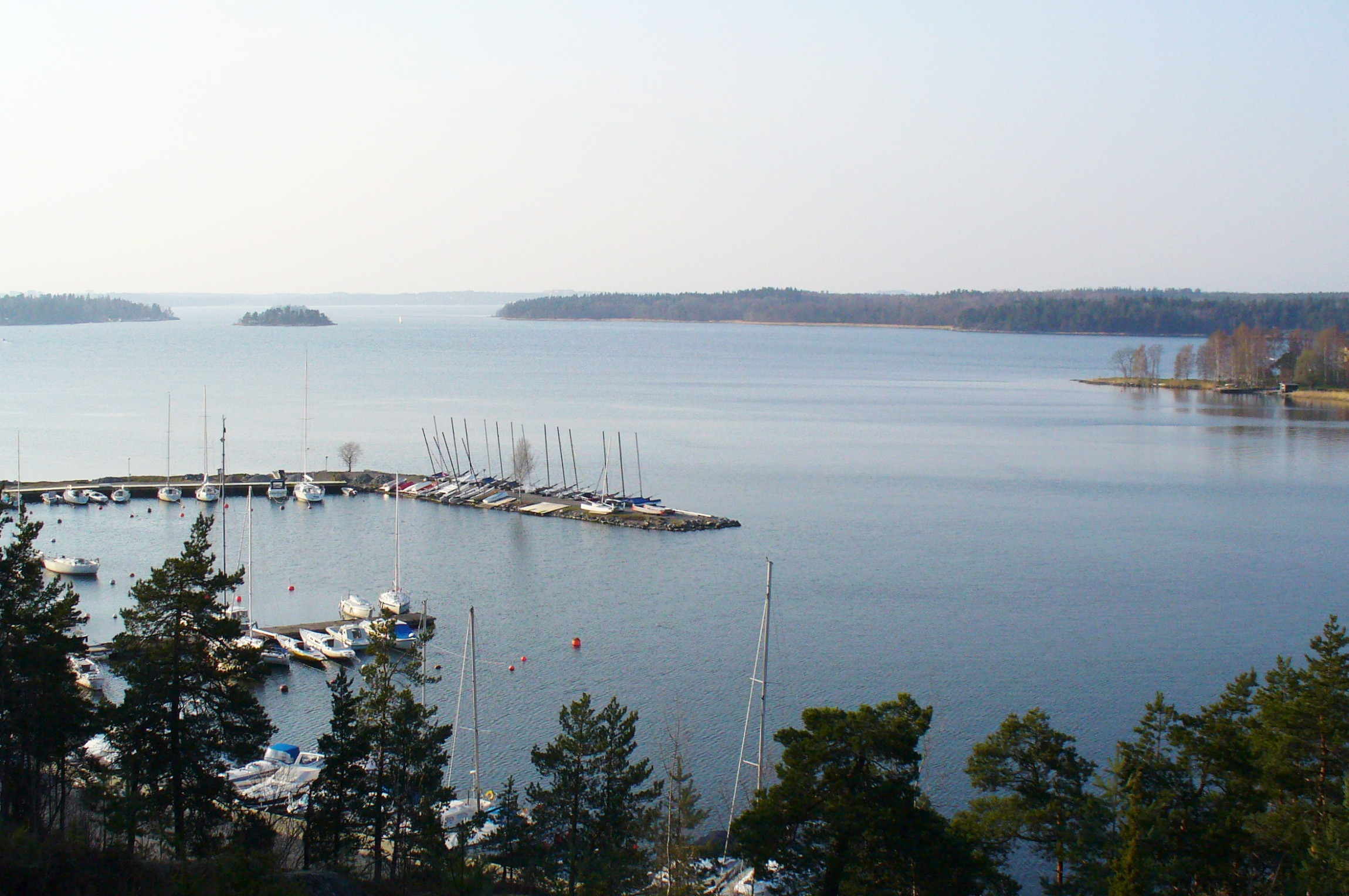 Askrikefjärden från/from Lidingö.